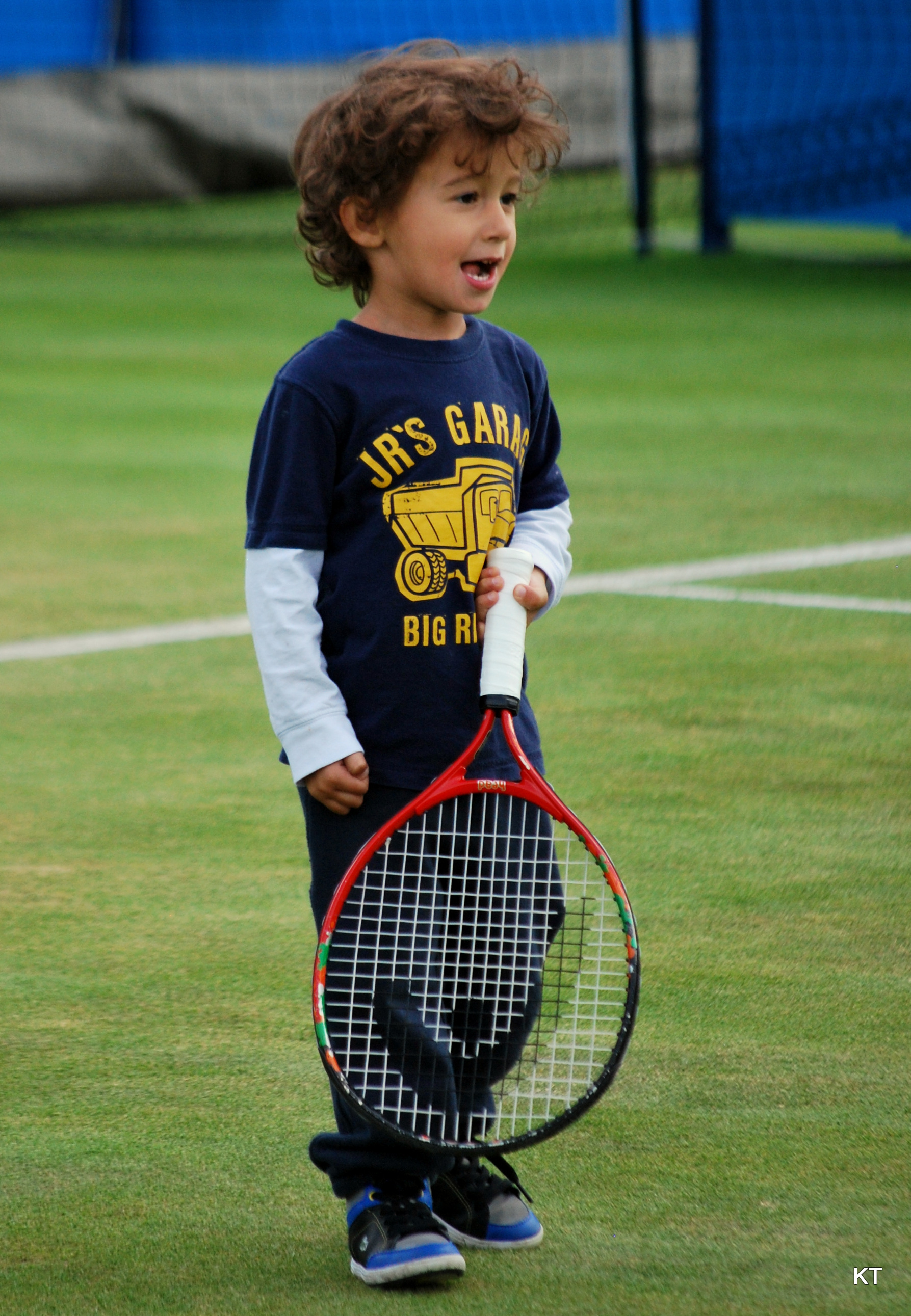 Zimonjic junior.